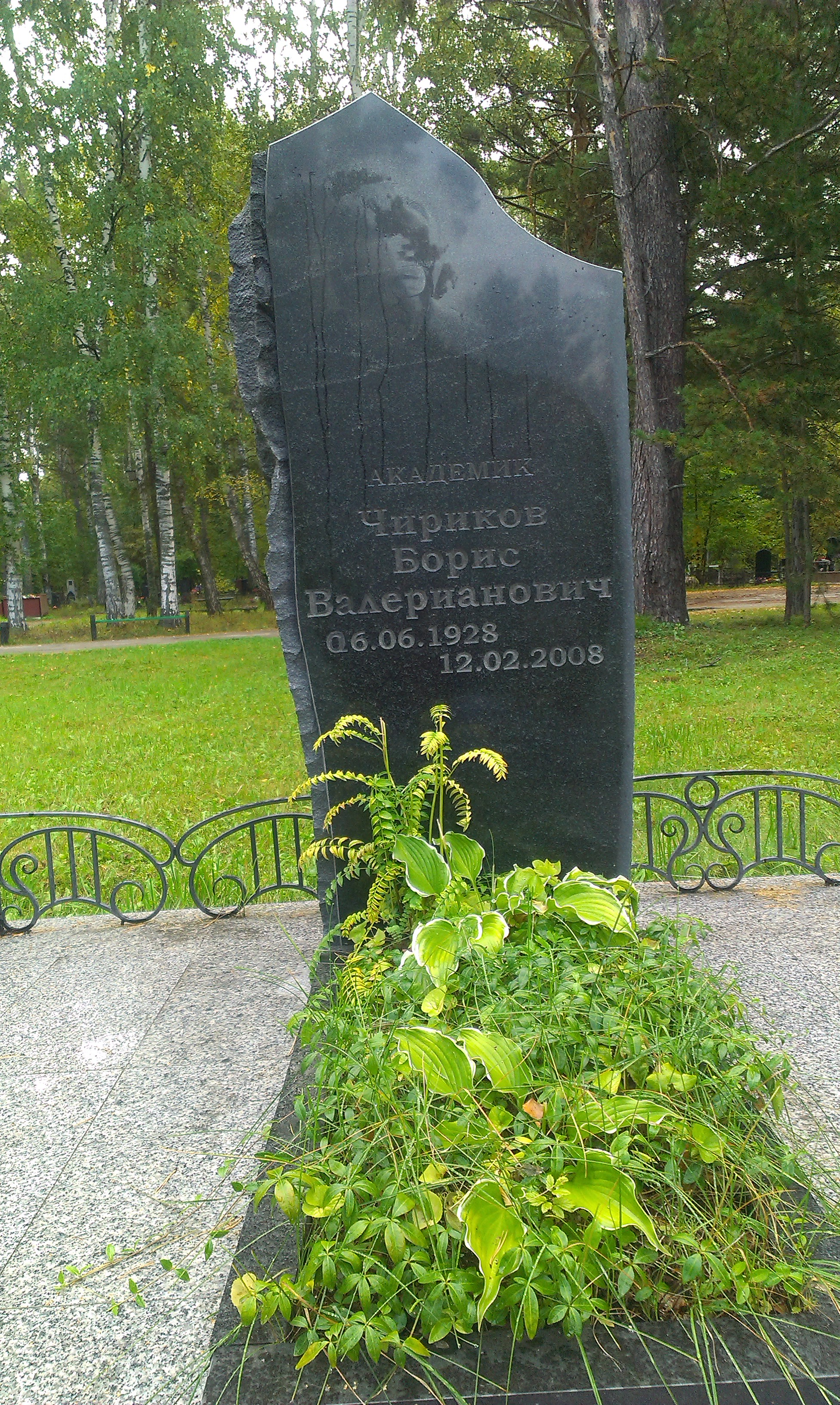 Южное (Чербузинское) кладбище